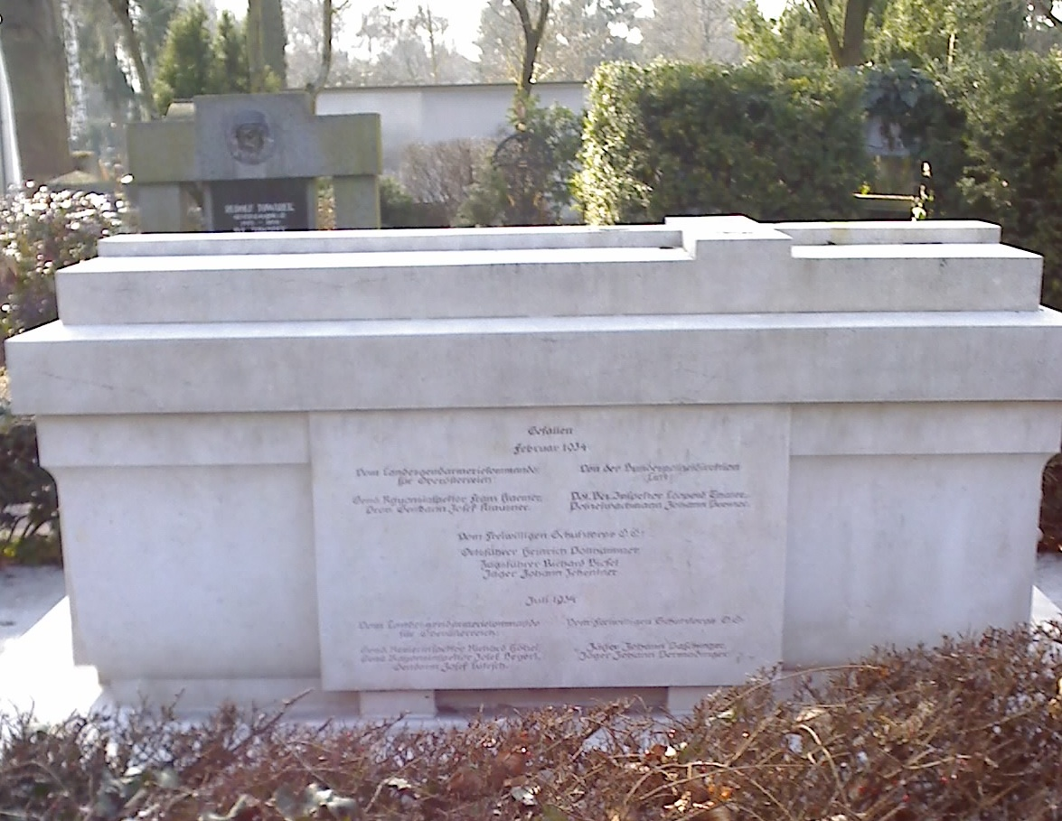 Denkmal für die Gefallenen im Jahre 1934